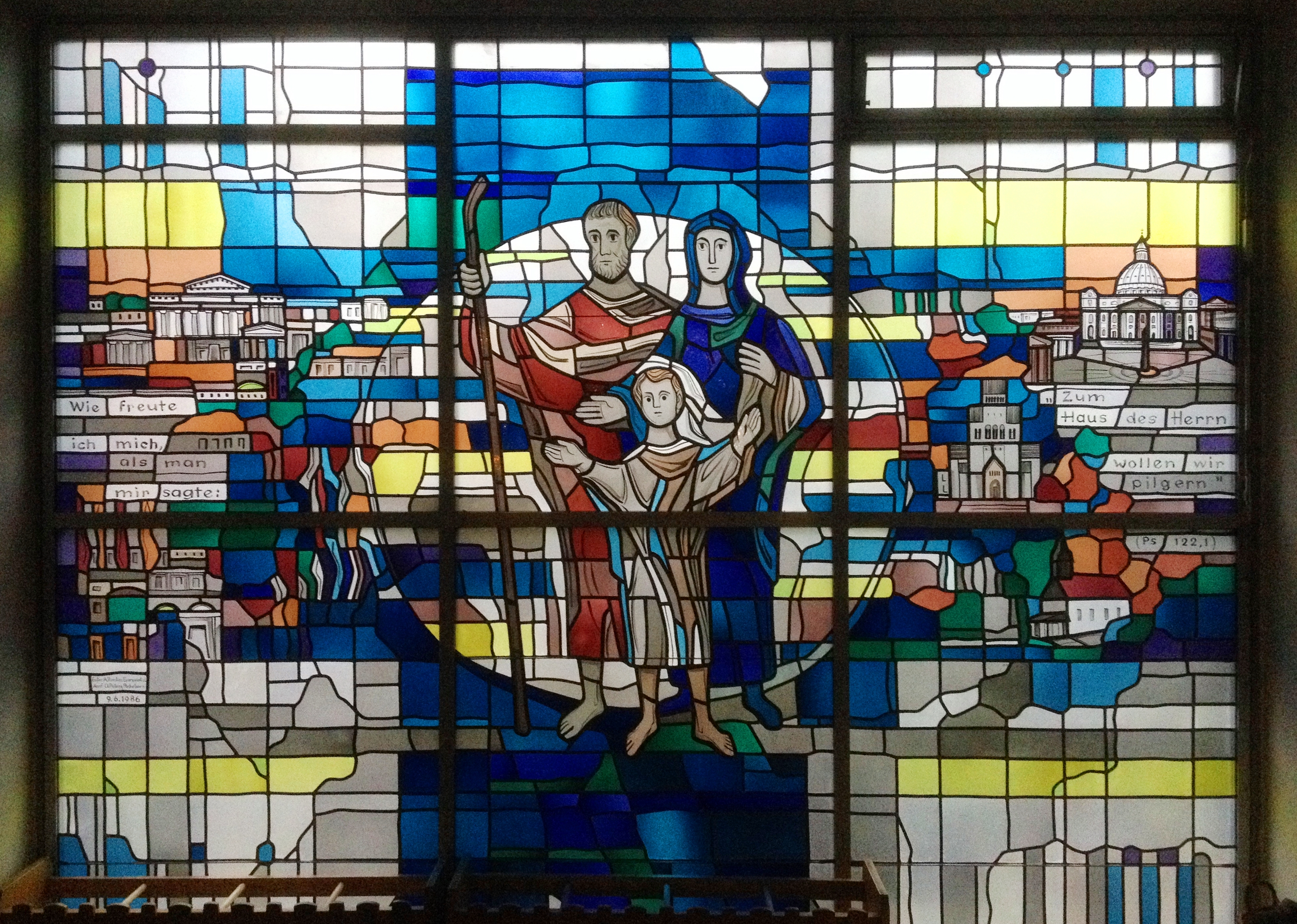 Vienenburg, kath. Kirche Hl. Familie, Bildfenster am Eingang: Maria und Josef mit dem zwölfjährigen Jesus auf dem Weg nach Jerusalem: links der Jerusalemer Tempel, rechts der Petersdom, der Hildesheimer Dom und die kath. Kirche Vienenburg